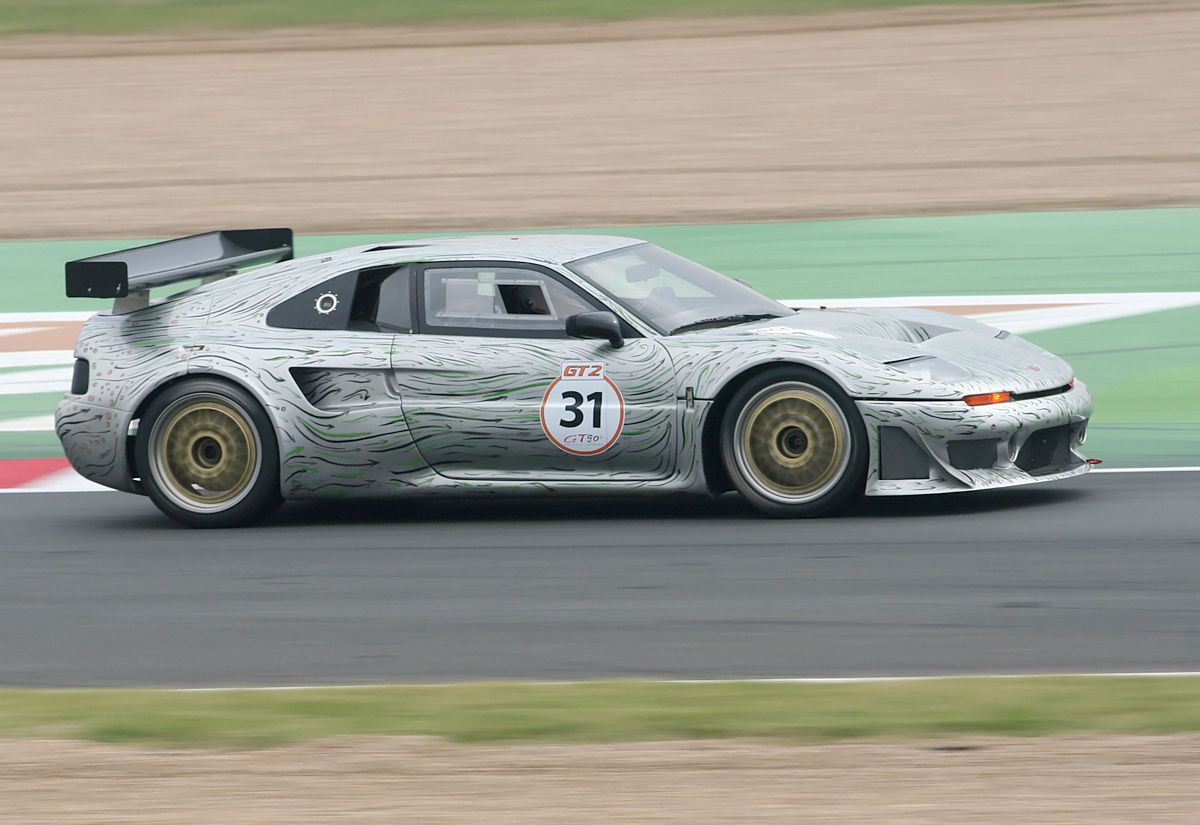 300 GTR